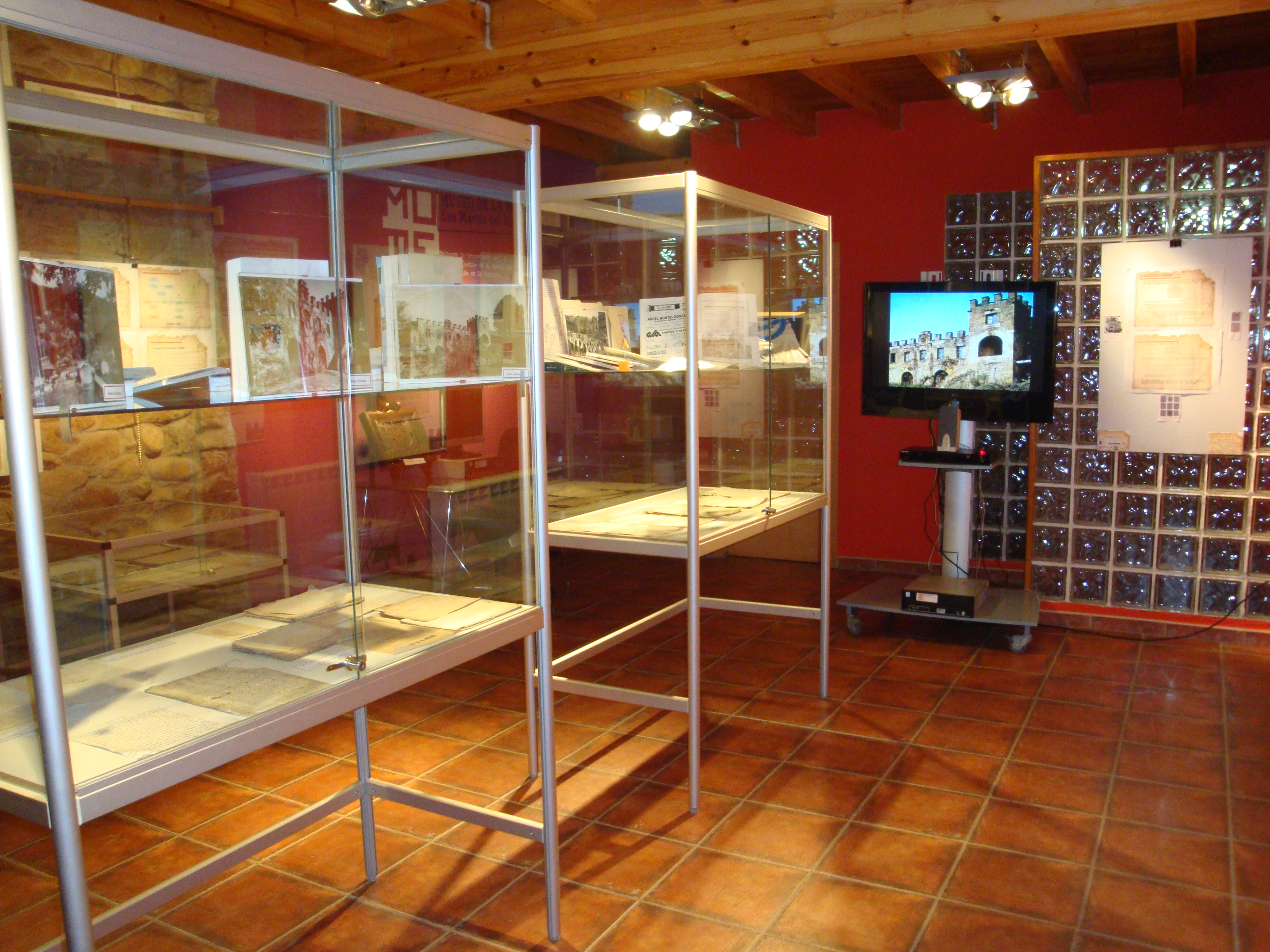 Esposición sobre'l Castiellu de Blimea na Casona del Bravial